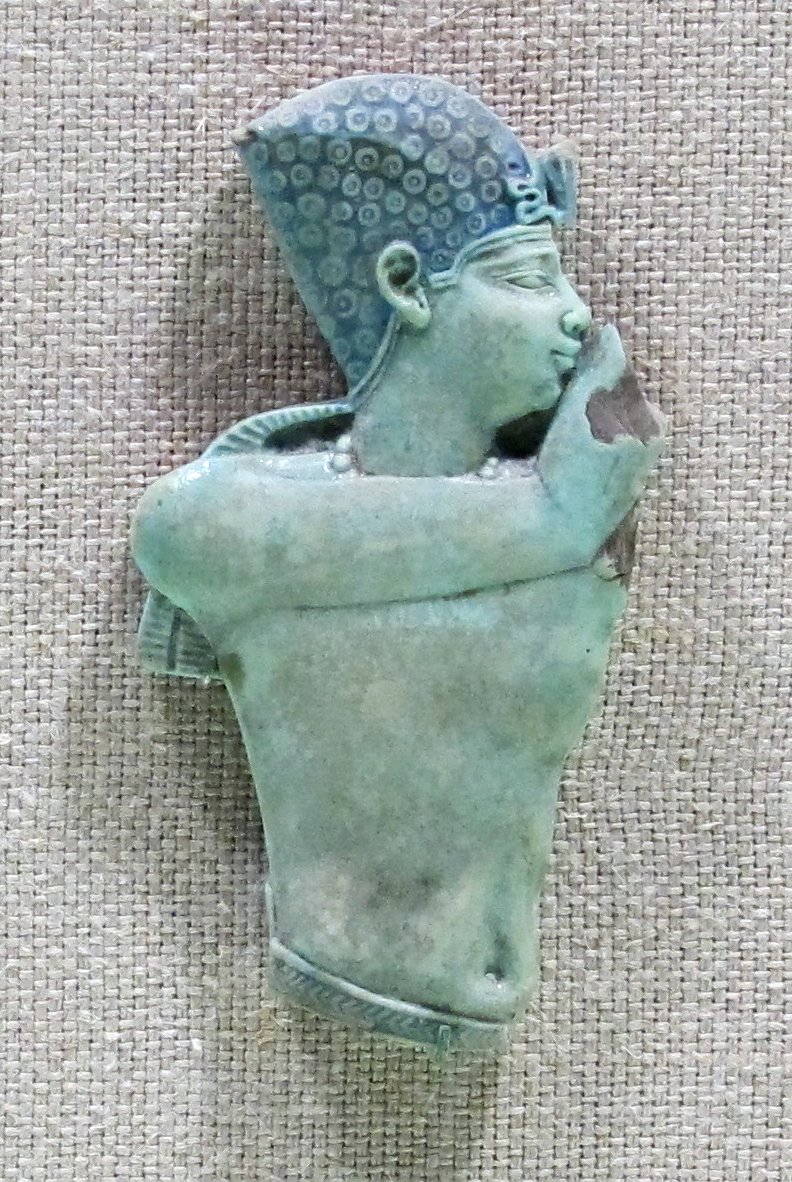 Collezione del Metropolitan Museum, NYC